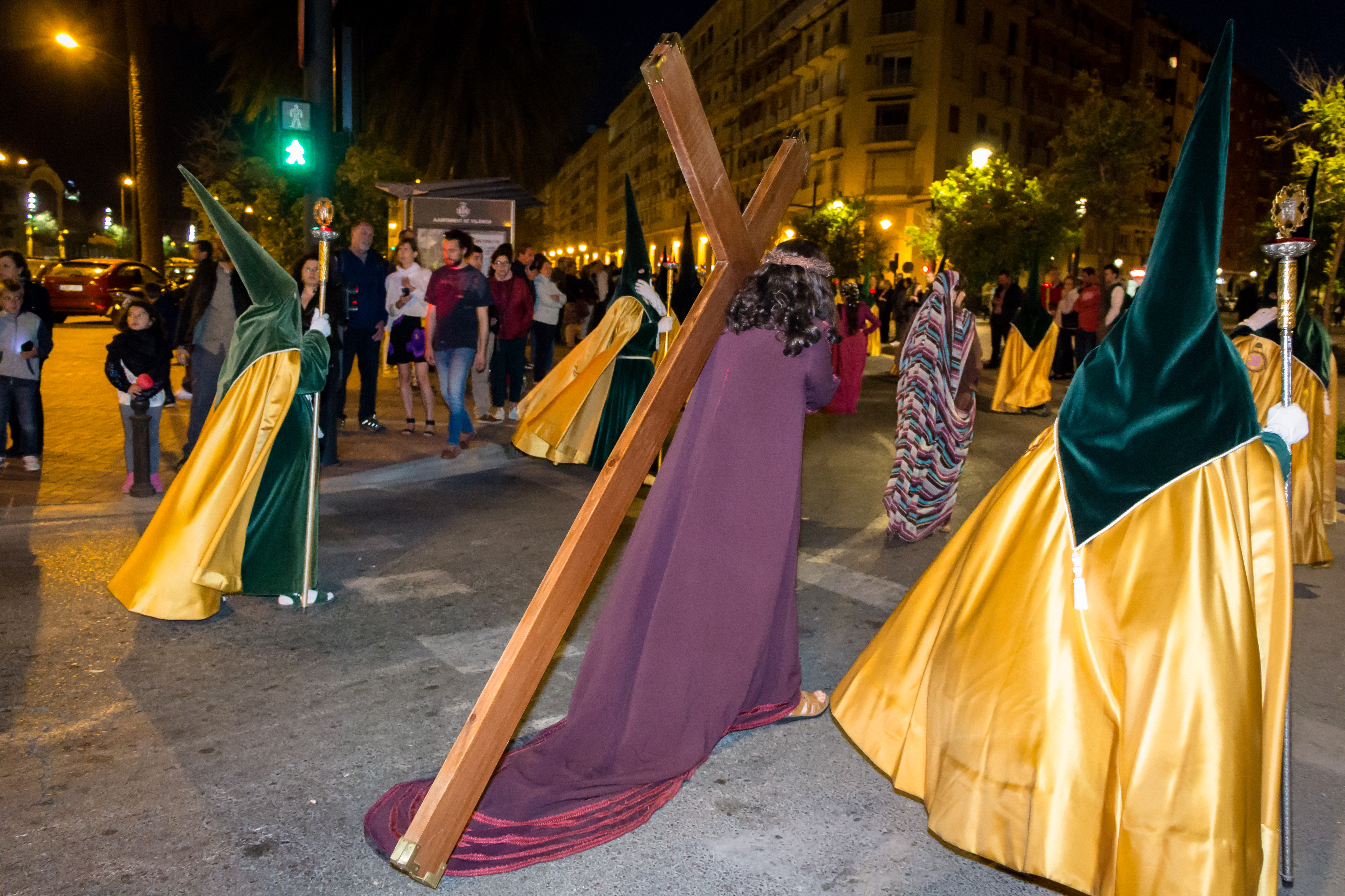 La Procesión del Santo Entierro de la Semana Santa Marinera tiene lugar la noche de Viernes Santo. This is a photography of a Folklore festival in Spain (Wikidata id Q9075846).